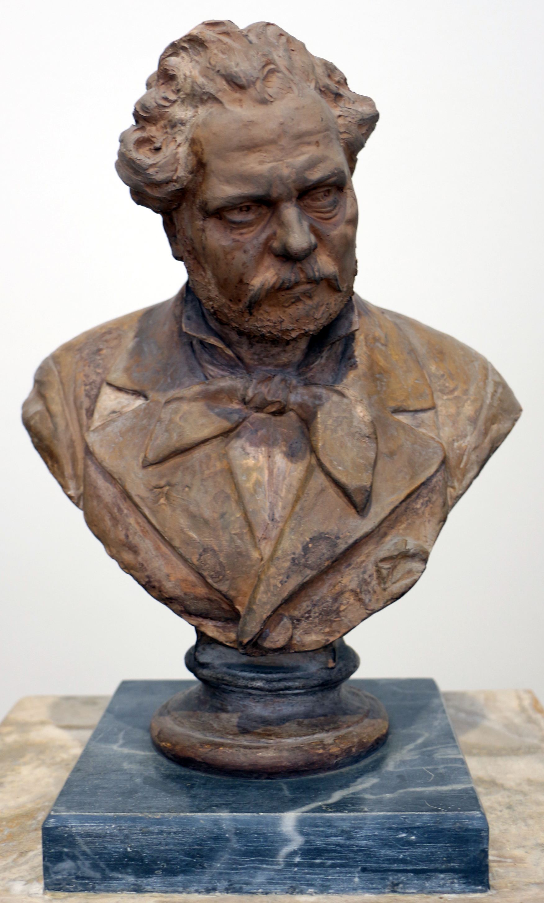 Sculptures in the Galleria nazionale d'arte moderna (Rome) This is a photo of a monument which is part of cultural heritage of Italy.